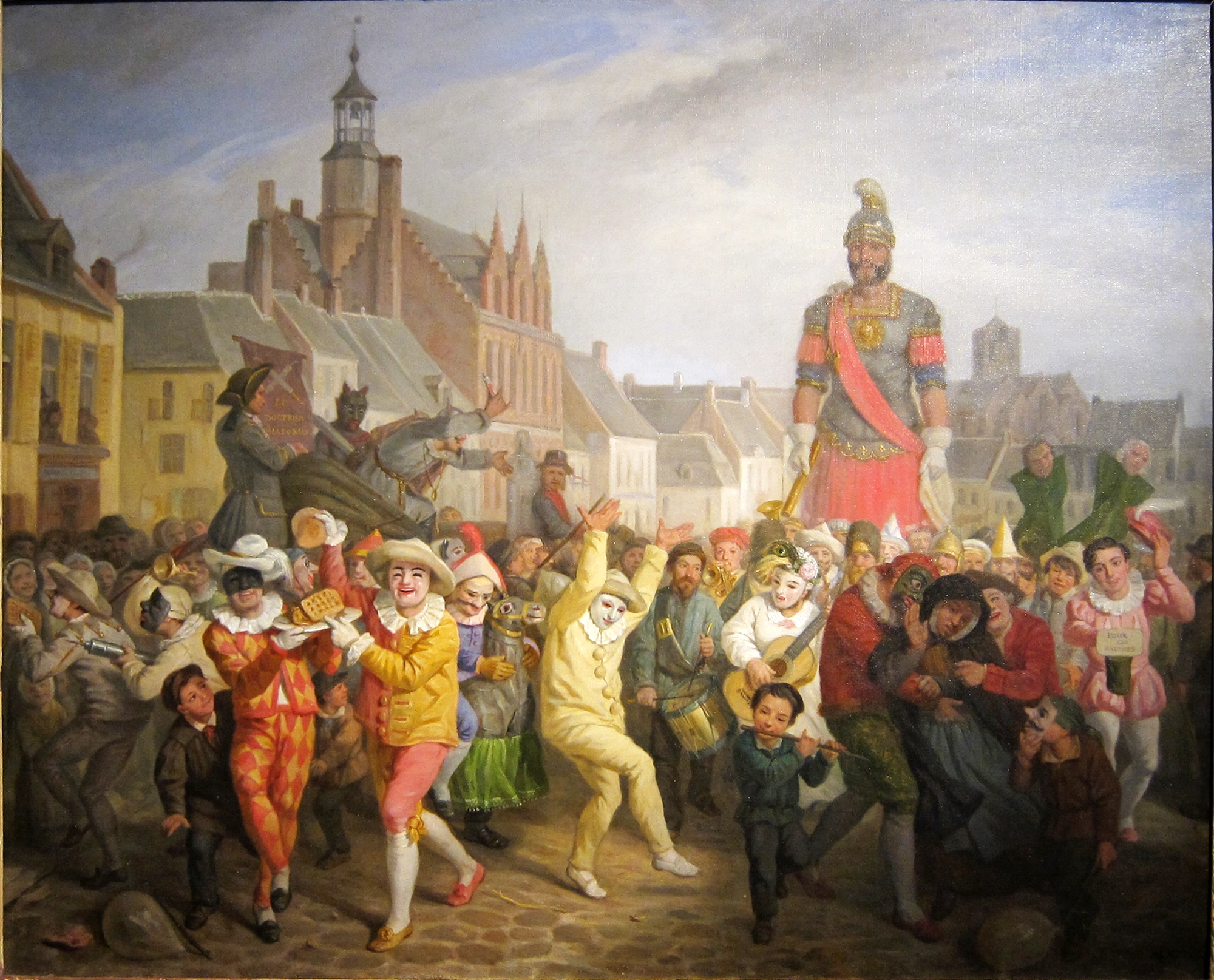 Le carnaval de Cassellabel QS:Lfr,"Le carnaval de Cassel"